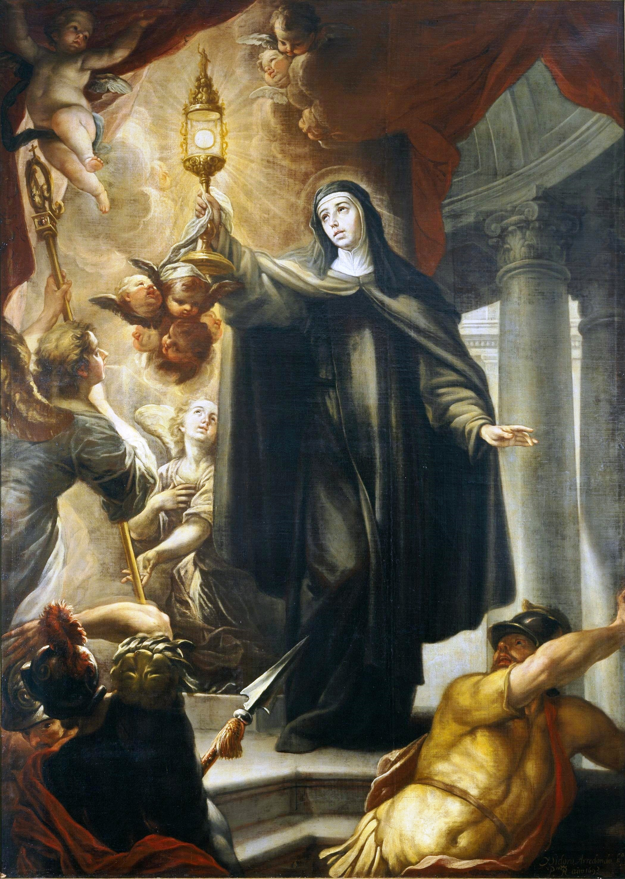 La obra representa a Santa Clara de Asís ahuyentando o expulsando a los infieles por medio de la Sagrada Eucaristía.